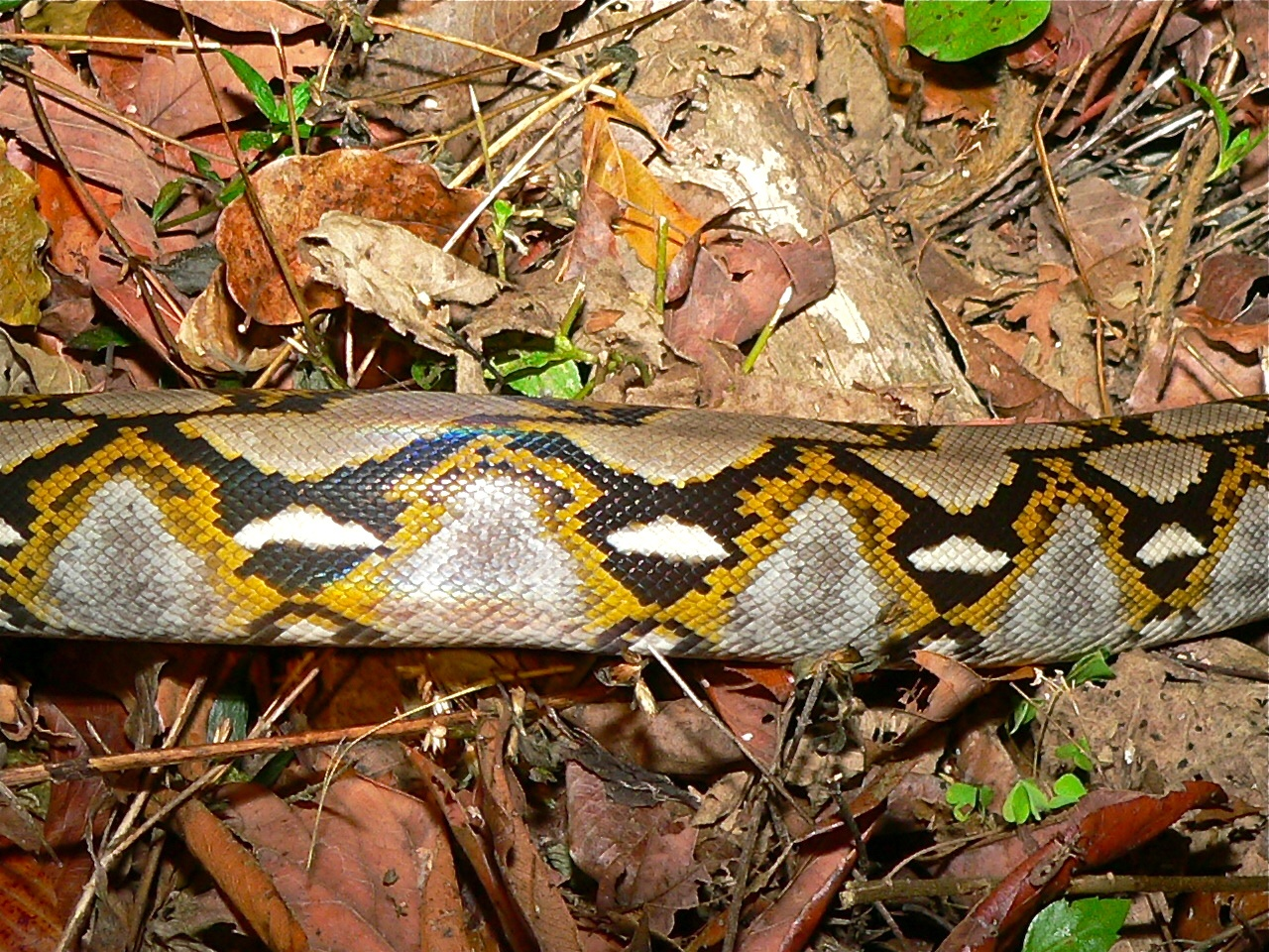 Khao Yai NP, THAILAND